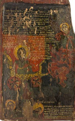 Вознесение на Св. Илија, црква Св. Богородица, с. Јелошник. Крај на XVIII век. Автор неидентификуван. Дим: 77 Х 49 Х 4 см